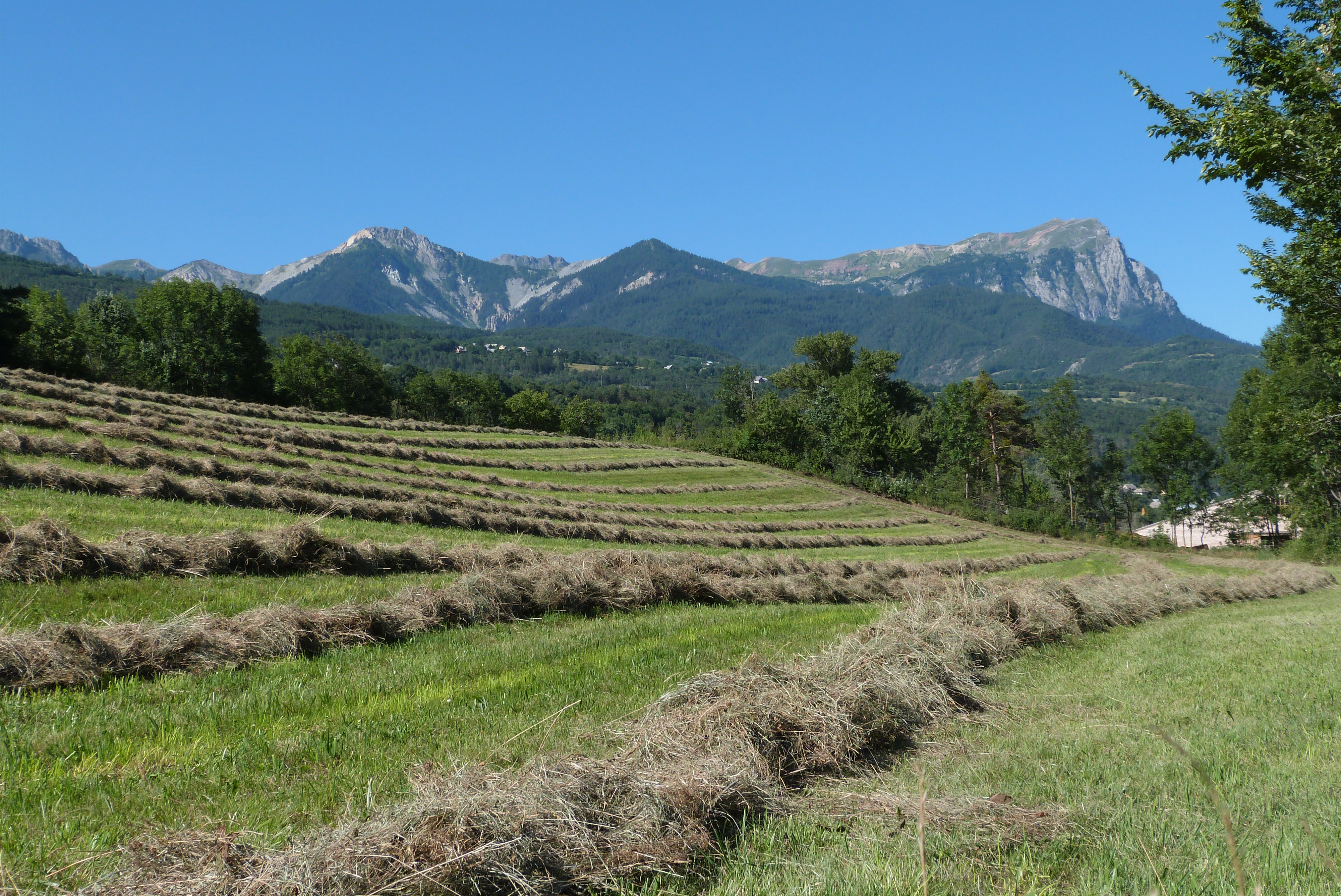 Un lieu de balade très agréable